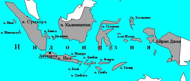 Карта на Индонезия.